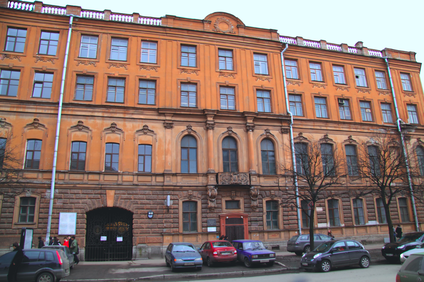 Учебный корпус Университета ИТМО на улице Чайковского